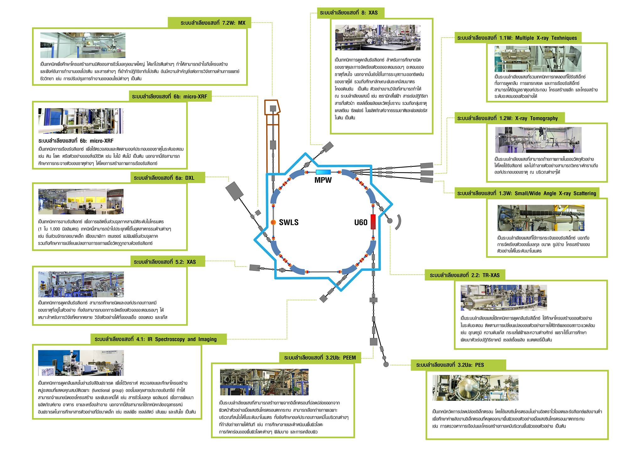 ระบบลำเลียงแสงซินโครตรอน